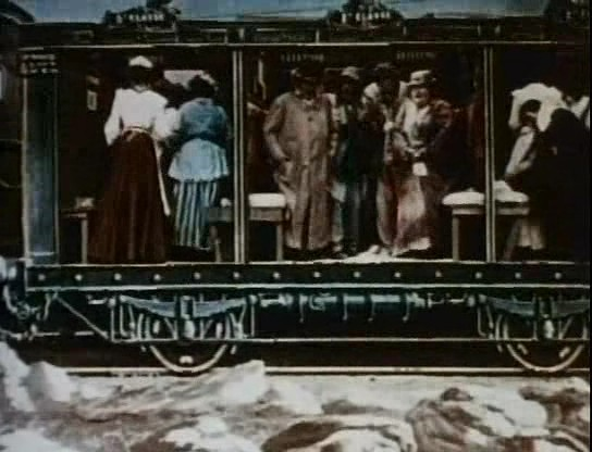 Méliès, Le voyage a travers l'impossible1904 colorizée 08